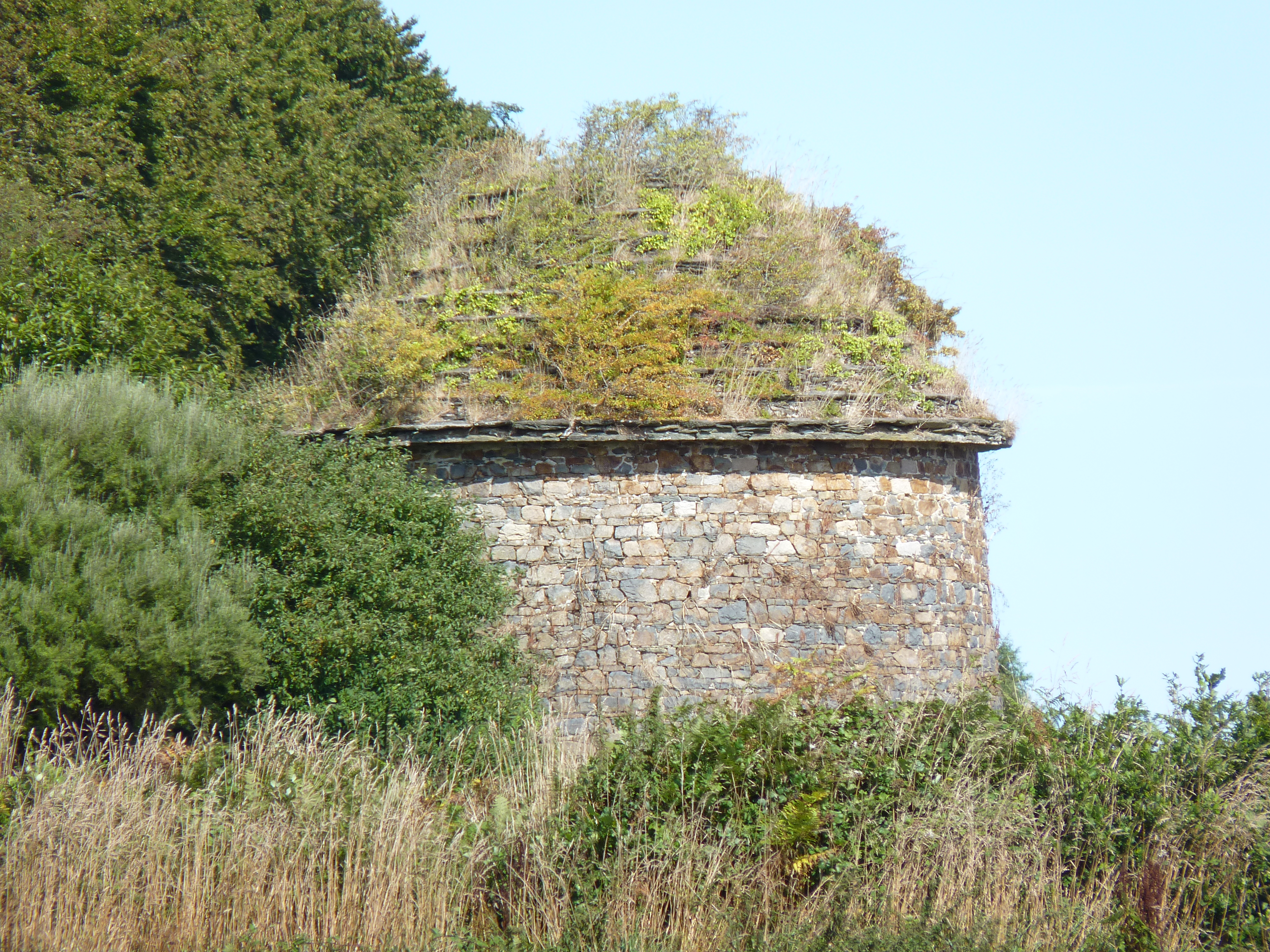 Seul le pigeonnier (inscrit MH) est visible.